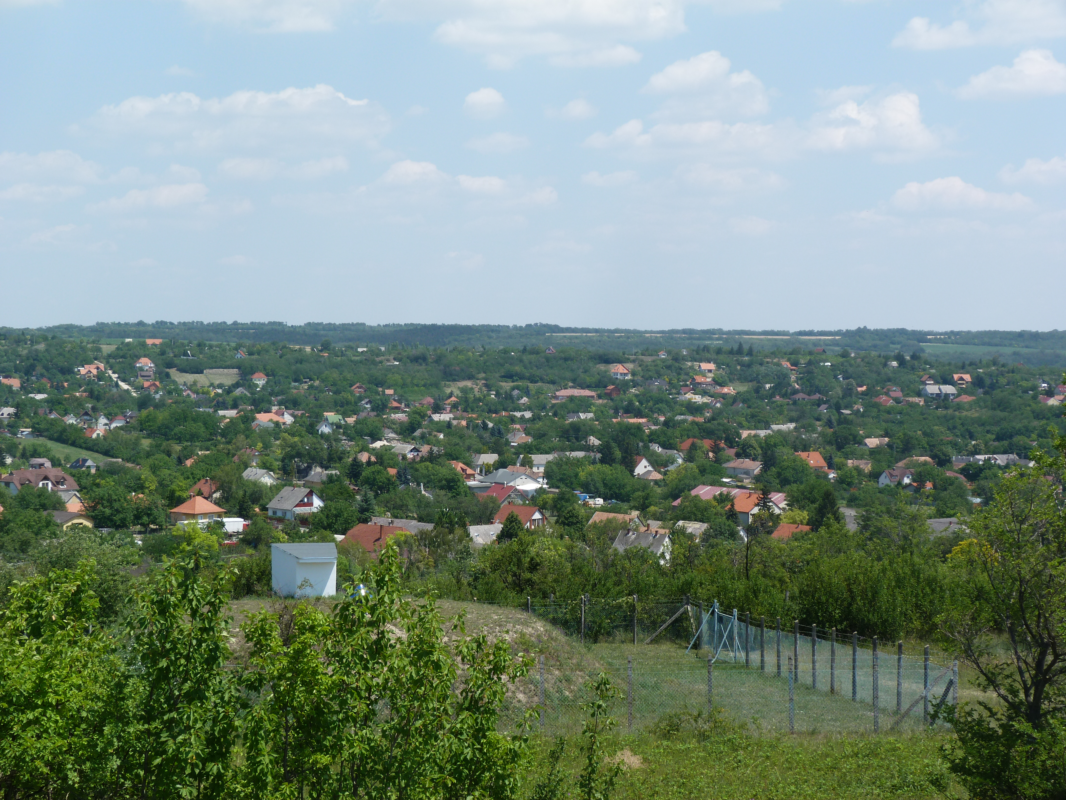 A felvétel 2012. június 24 -én készült Balatonkenesén, a Vak Bottyán strandon illetve a Tátorjánosból illetve kilátóból. Megjelent Creative Commons alatt a Metapolisz DVD sorozatban.